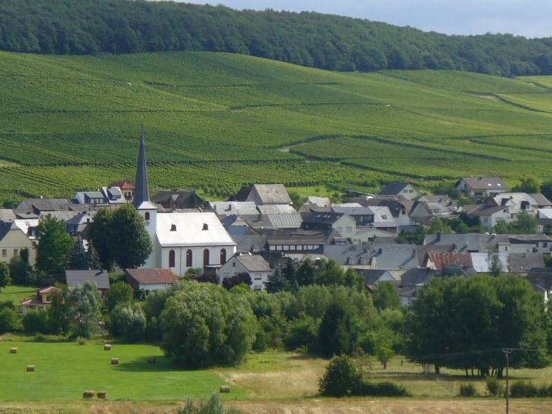 Osann-Monzel. Ortsteil Osann, im Hintergrund der Rosenberg. Aufgenommen aus südwestlicher Richtung beim Aufstieg zum Monzeler Hüttenkopf